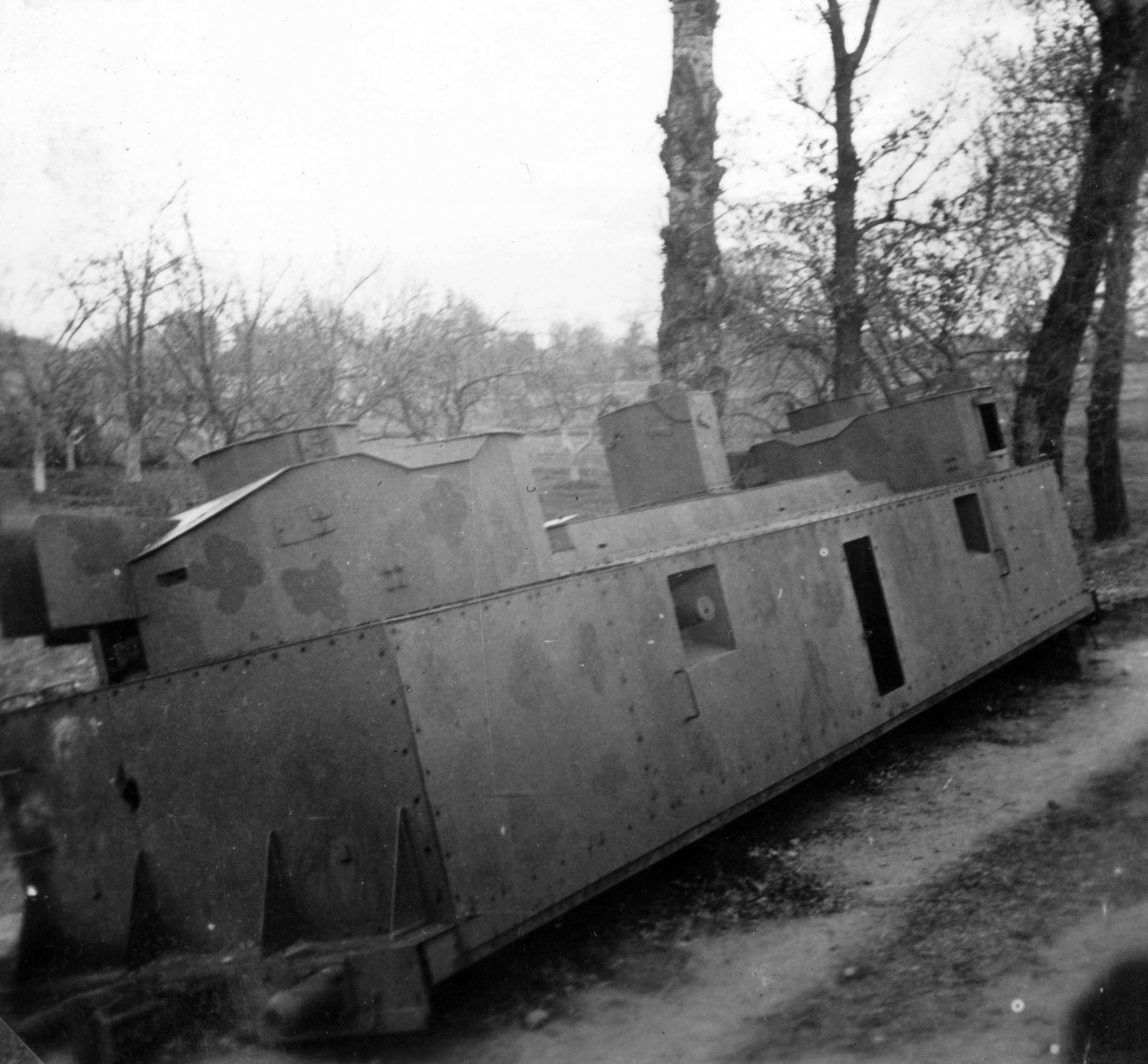 Szovjet gyártmányú, BP-35 típusú páncélvonat lövegkocsijának roncsa.Russia? Tags: wreck, armored railway, second World War Title: Szovjet gyártmányú, BP-35 típusú páncélvonat lövegkocsijának roncsa.